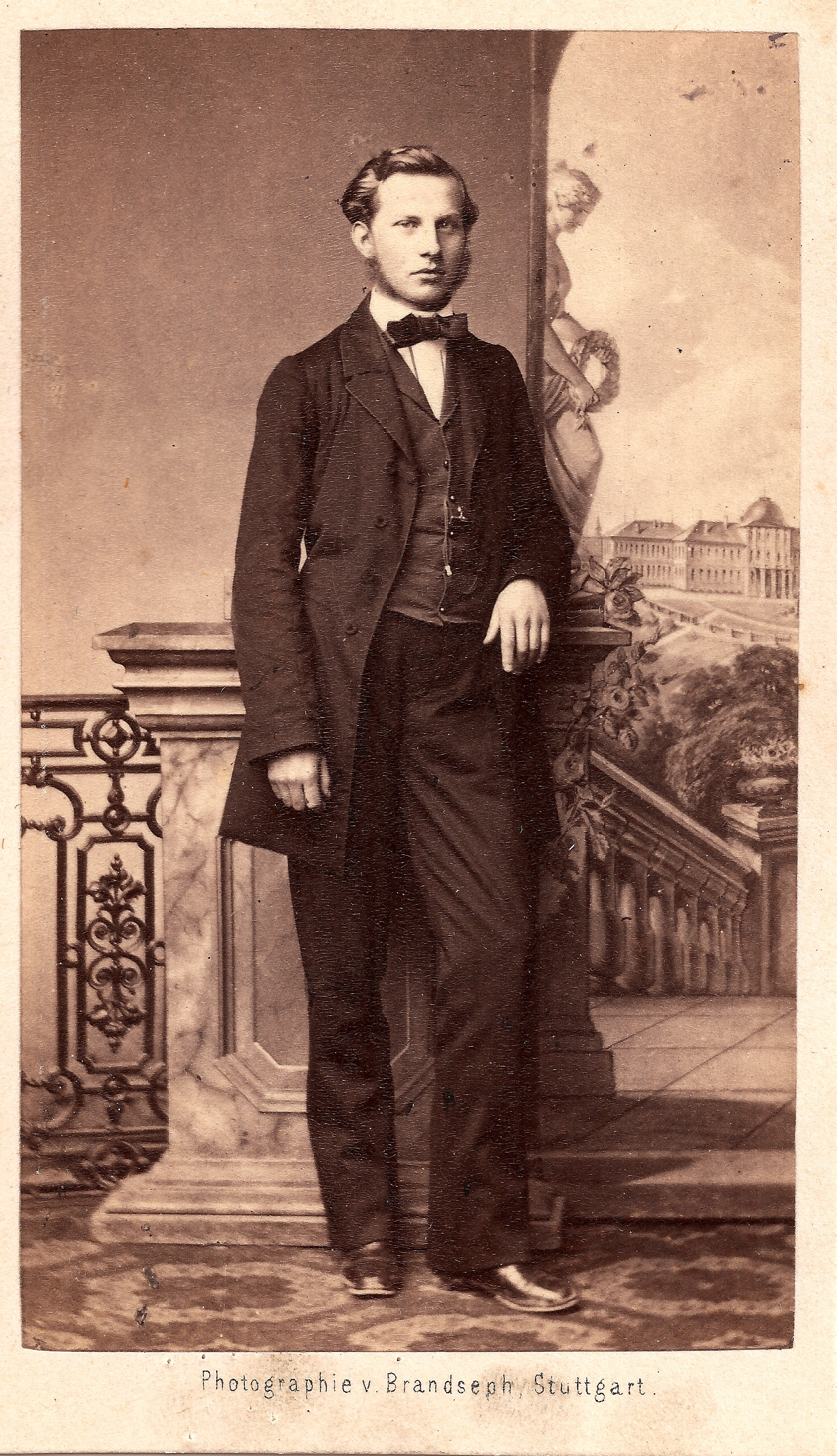 Ferdinand Haug, Fotografie, Albuminpapier